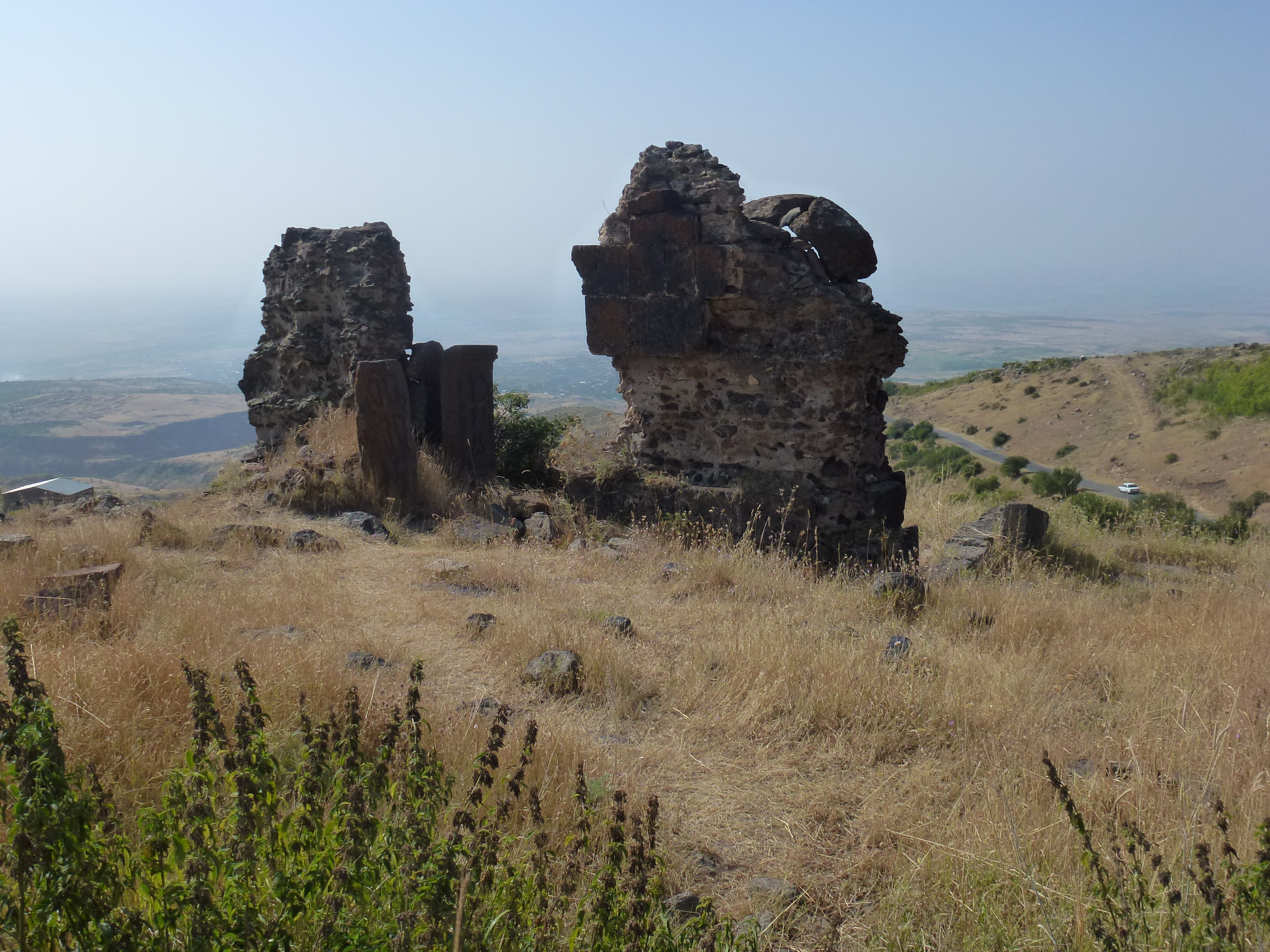 Տեղեր, Արագածոտնի մարզ, ՄԱՏՈՒՌ Ս. Հովհաննես 13 դ., 17 դ. հվ-ամ մասում 2.106/2 գյուղի եզրին, վրկնգ.՝ 17 դ., կիսավեր 106/2